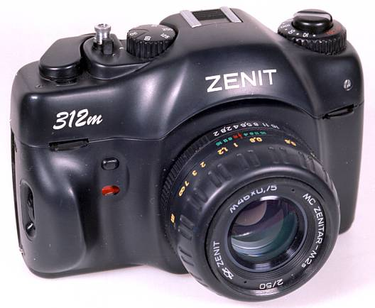 Фотоаппарат ЗЕНИТ-312m